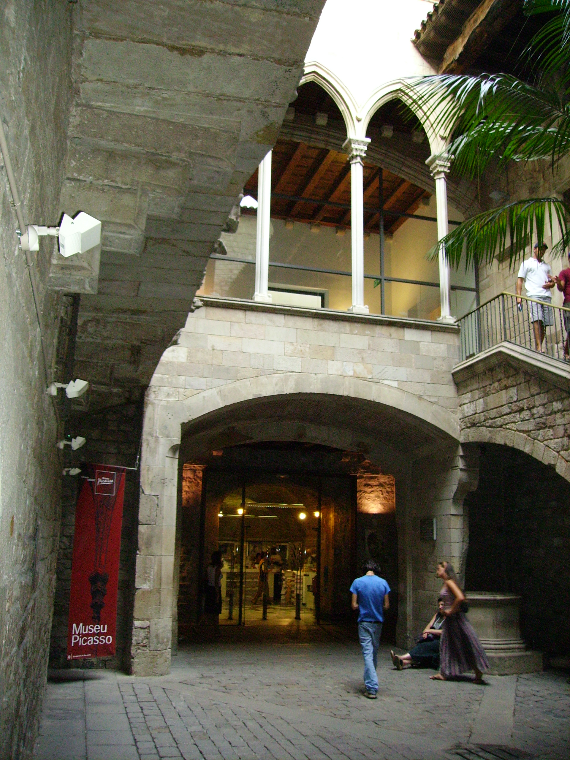 Museu Picasso, Barcelona, Catalunya.